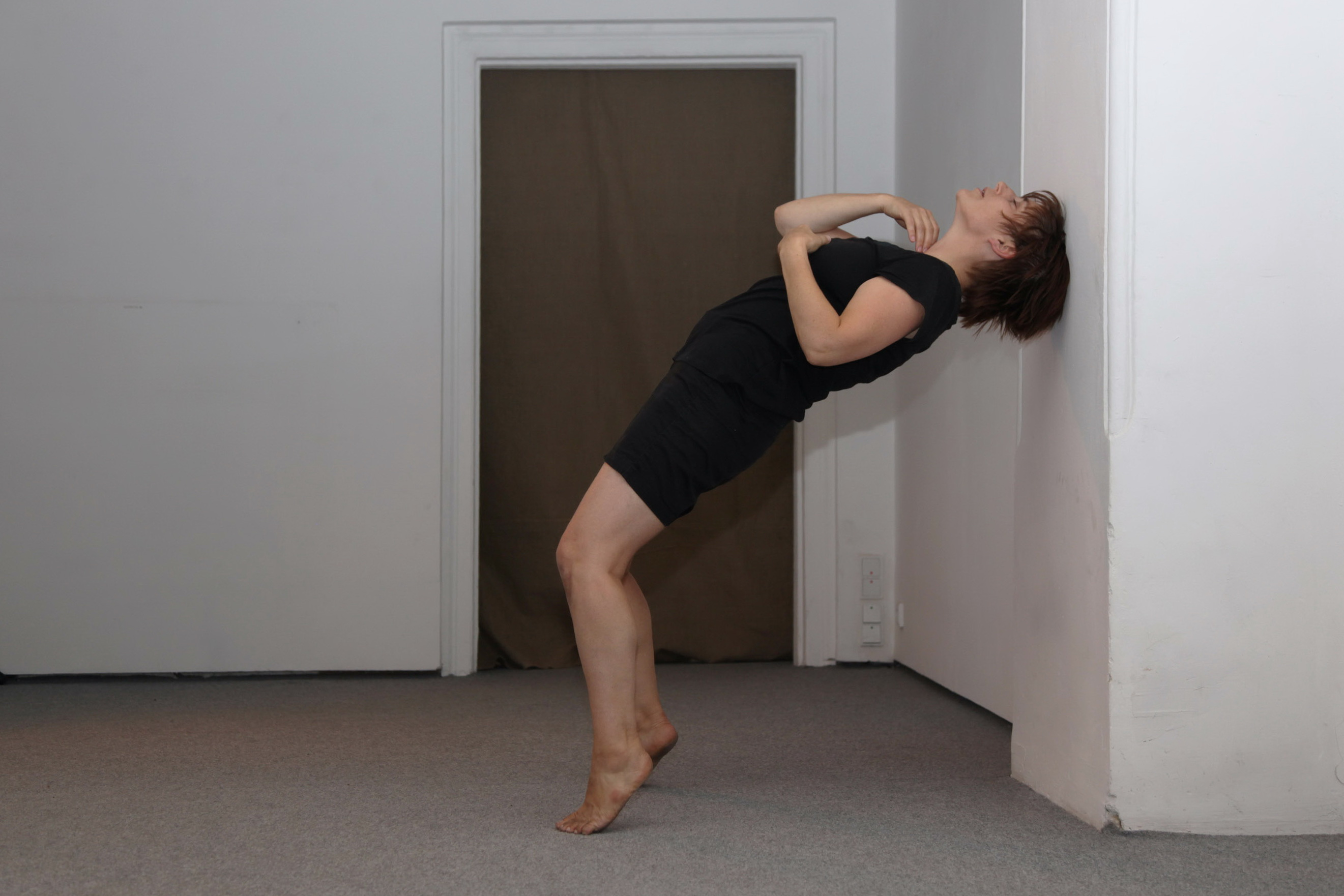 Перформанс TanzLaboratorium "SUPER NATURE"